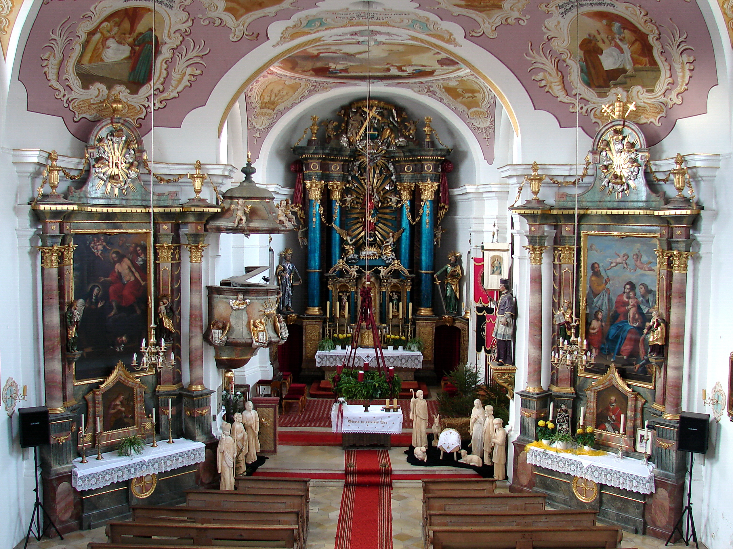 Katholische Pfarrkirche Mariä Lichtmeß